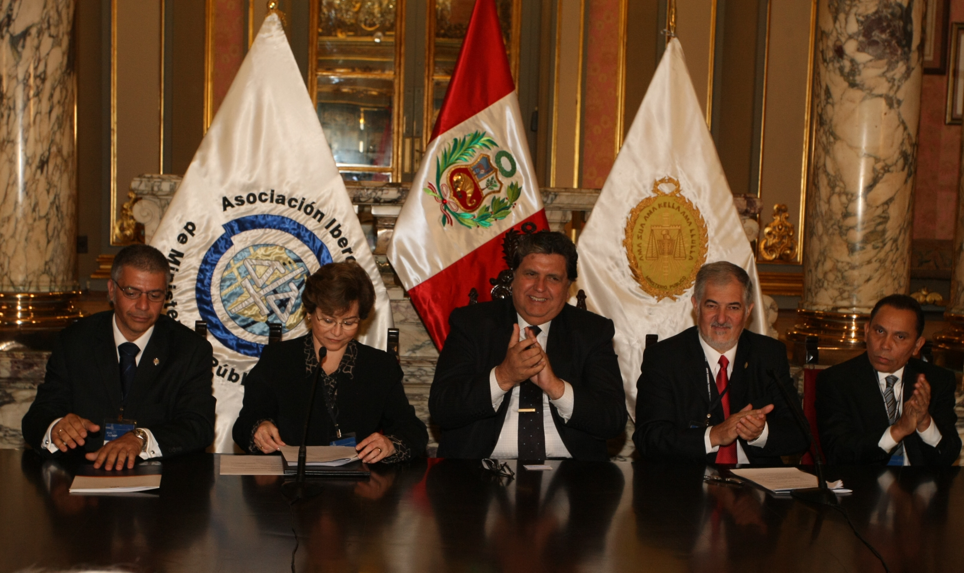 El Presidente de Perú, Alan Garcia, en la inauguración de la Asamblea general de la AIAMP en Lima, con la Fiscal General de la Nación, y el Presidente, el Vicepresidente y el Secrerario General de la Asociación.